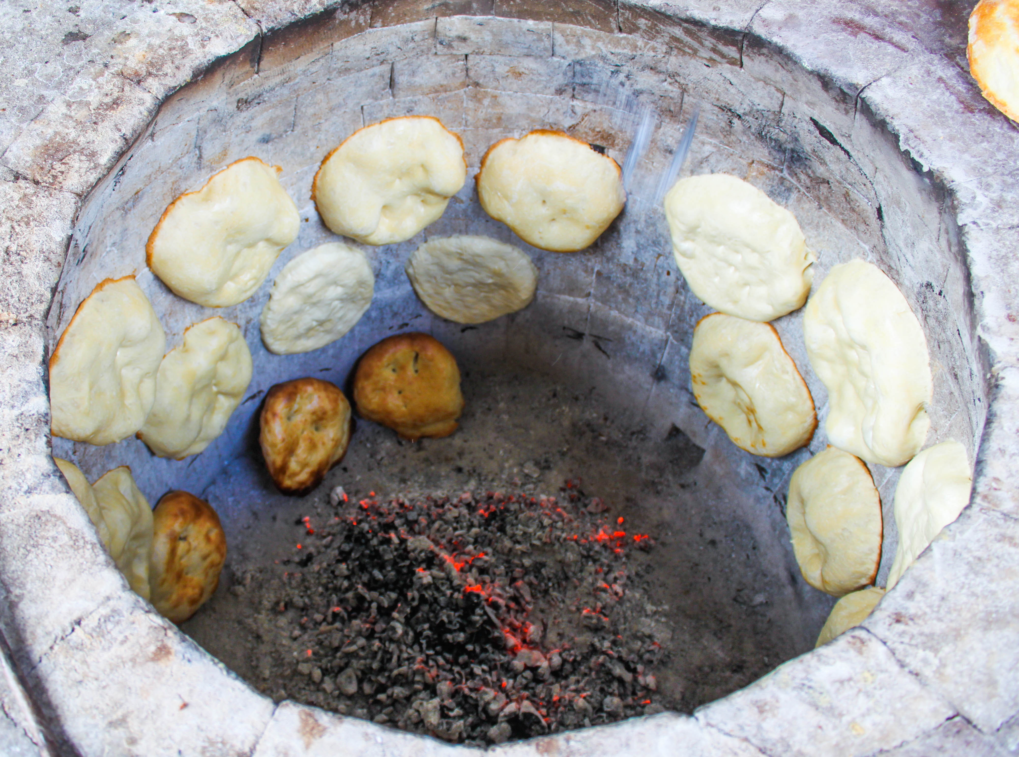 Təndirə yapılmış çörəklər